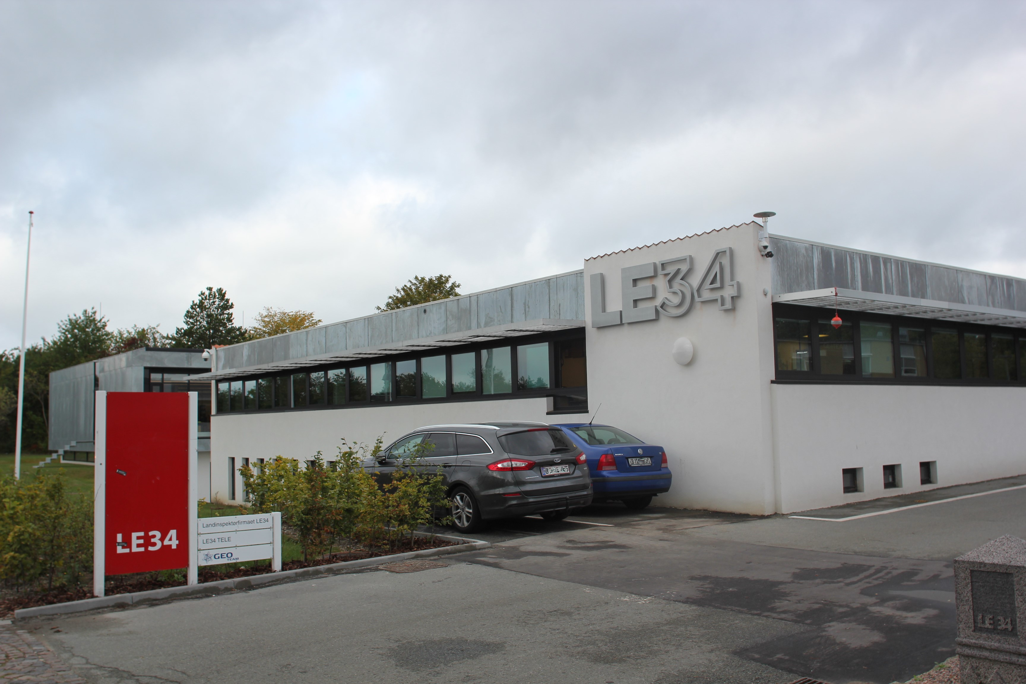 LE34s hovedkvarter på Energivej 34 i Ballerup.